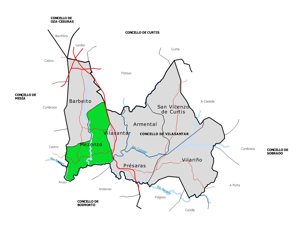 Mapa da parroquia de Mezonzo no concello de Vilasantar.